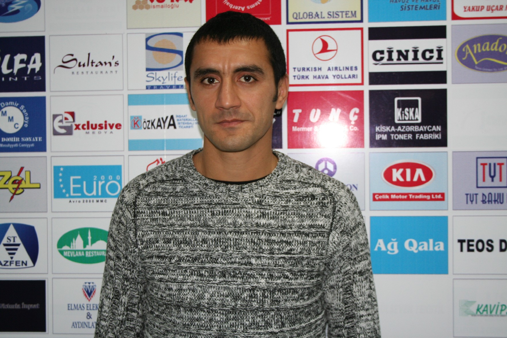 Хагани Мамедов Форвард Интер